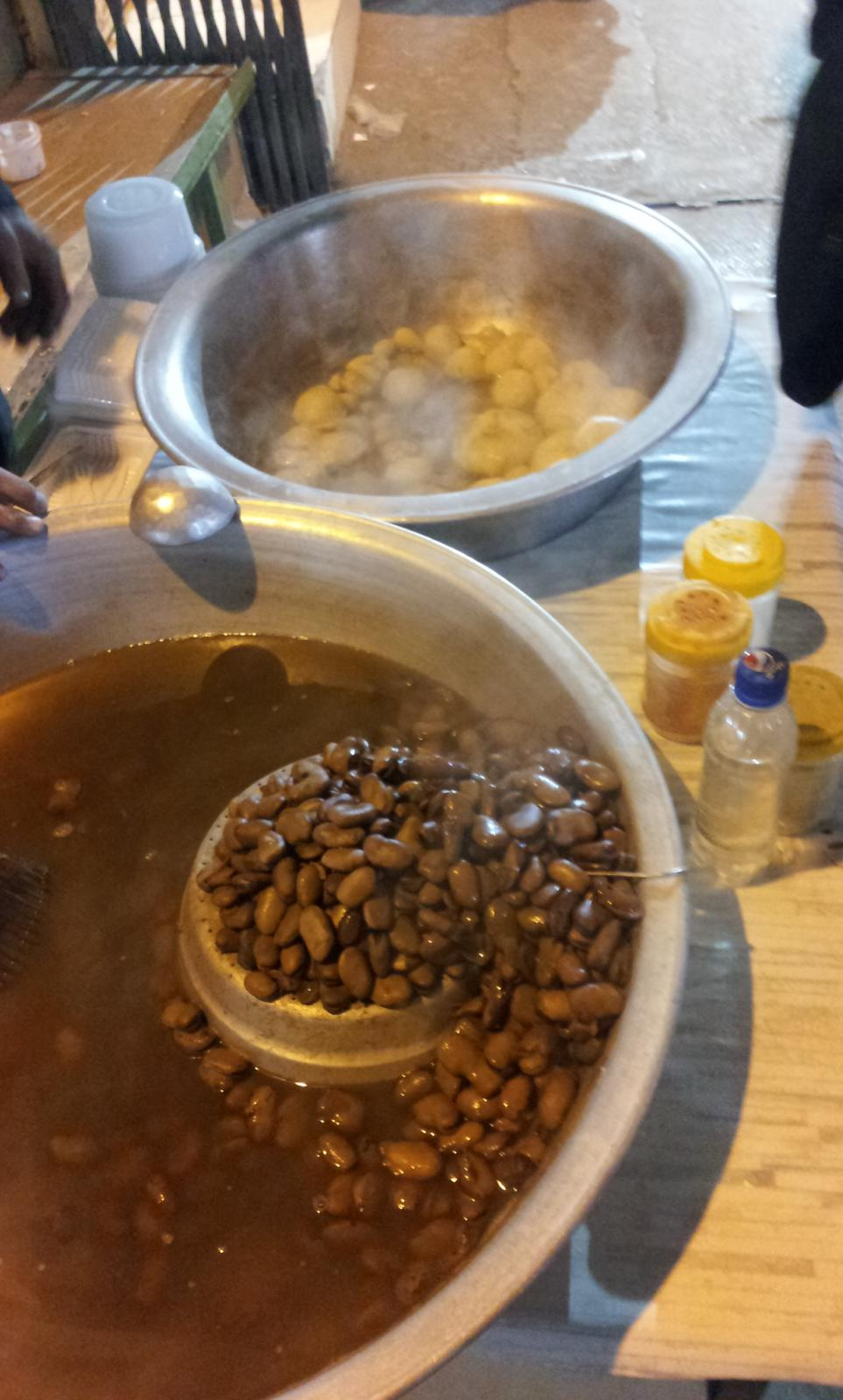 201312_iran_Shiraz_30